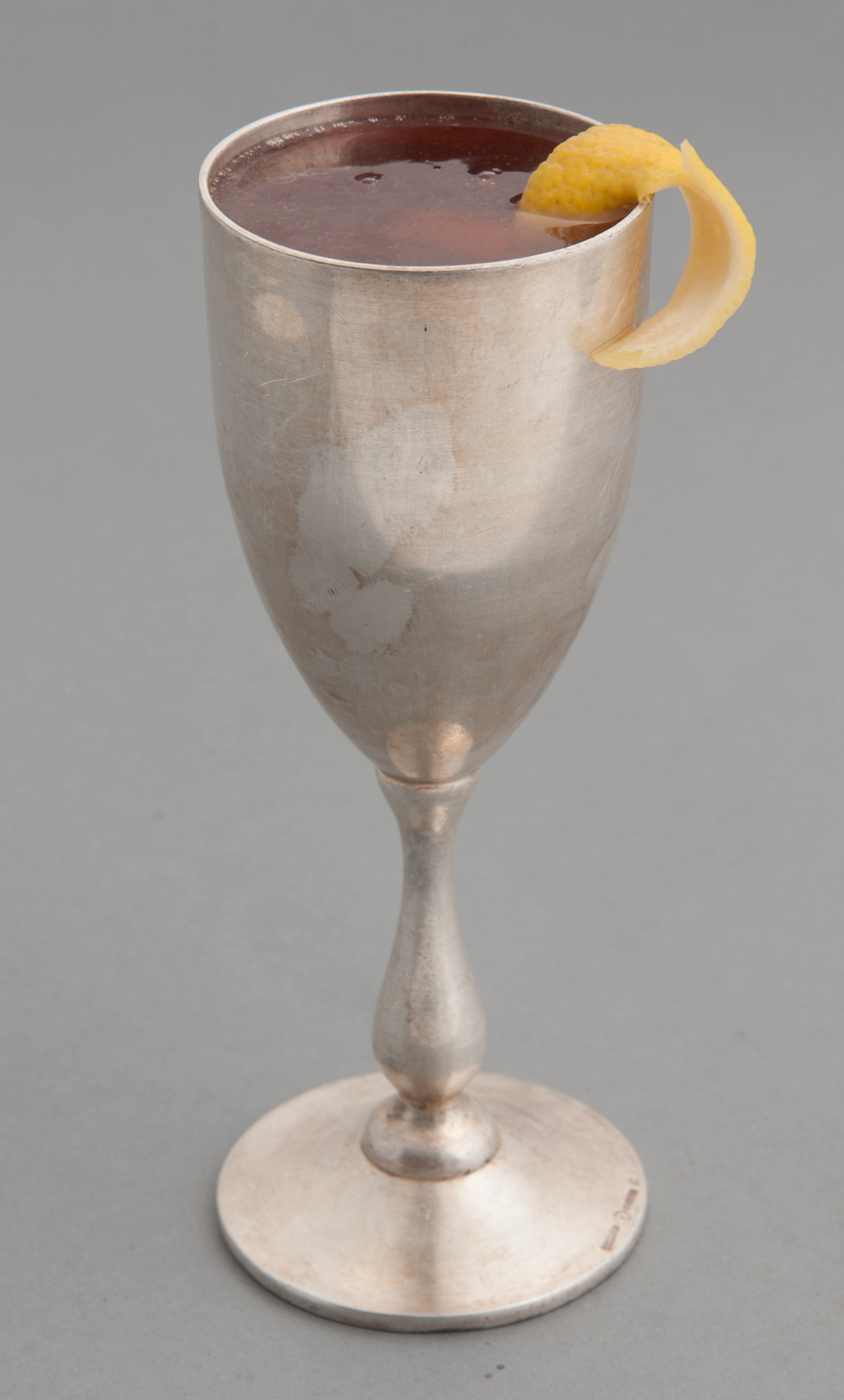 Cocktail Prince of Wales